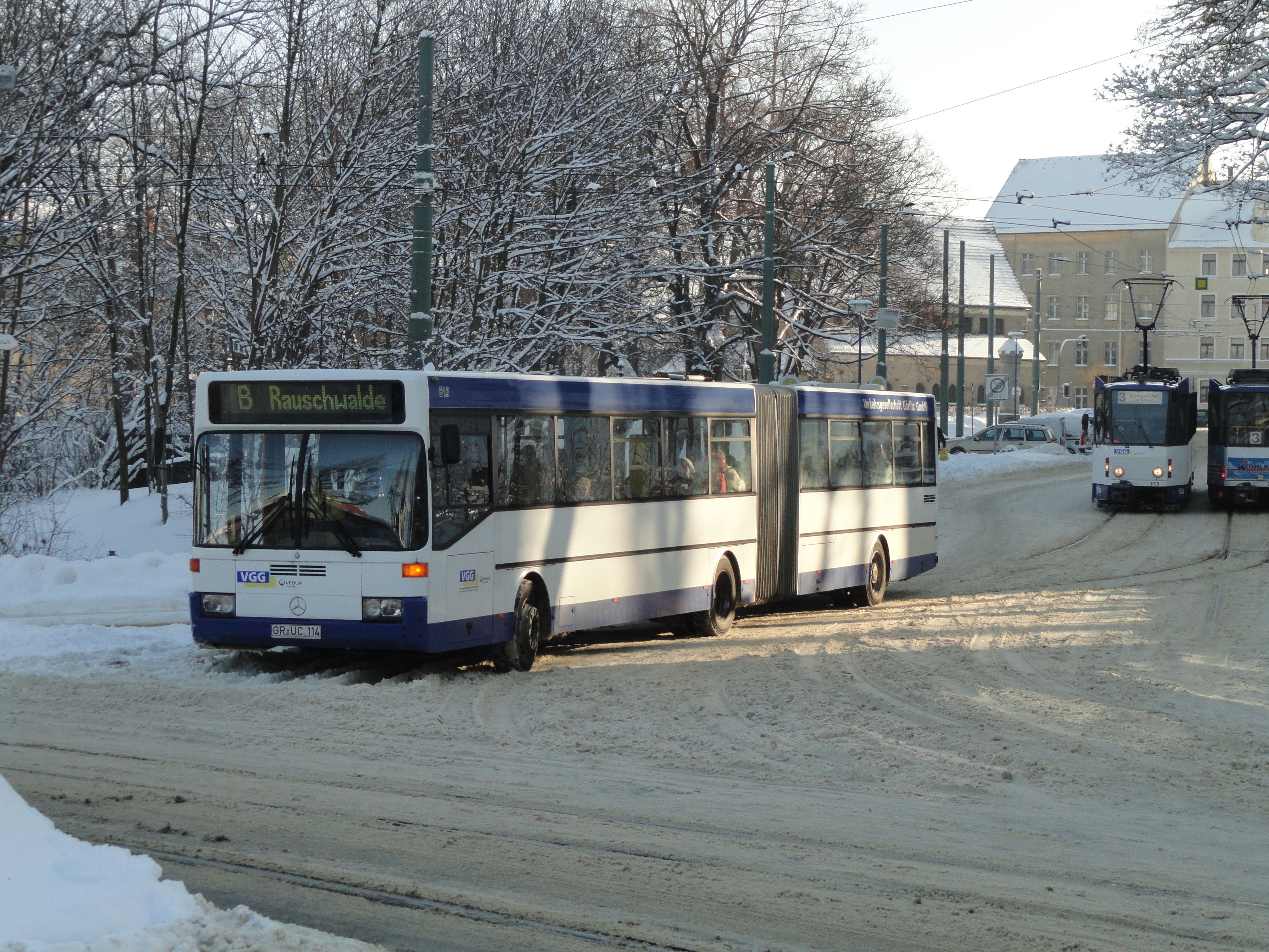 Bus 513 der Verkehrsgesellschaft Görlitz VGG am Bahnhof Südausgang